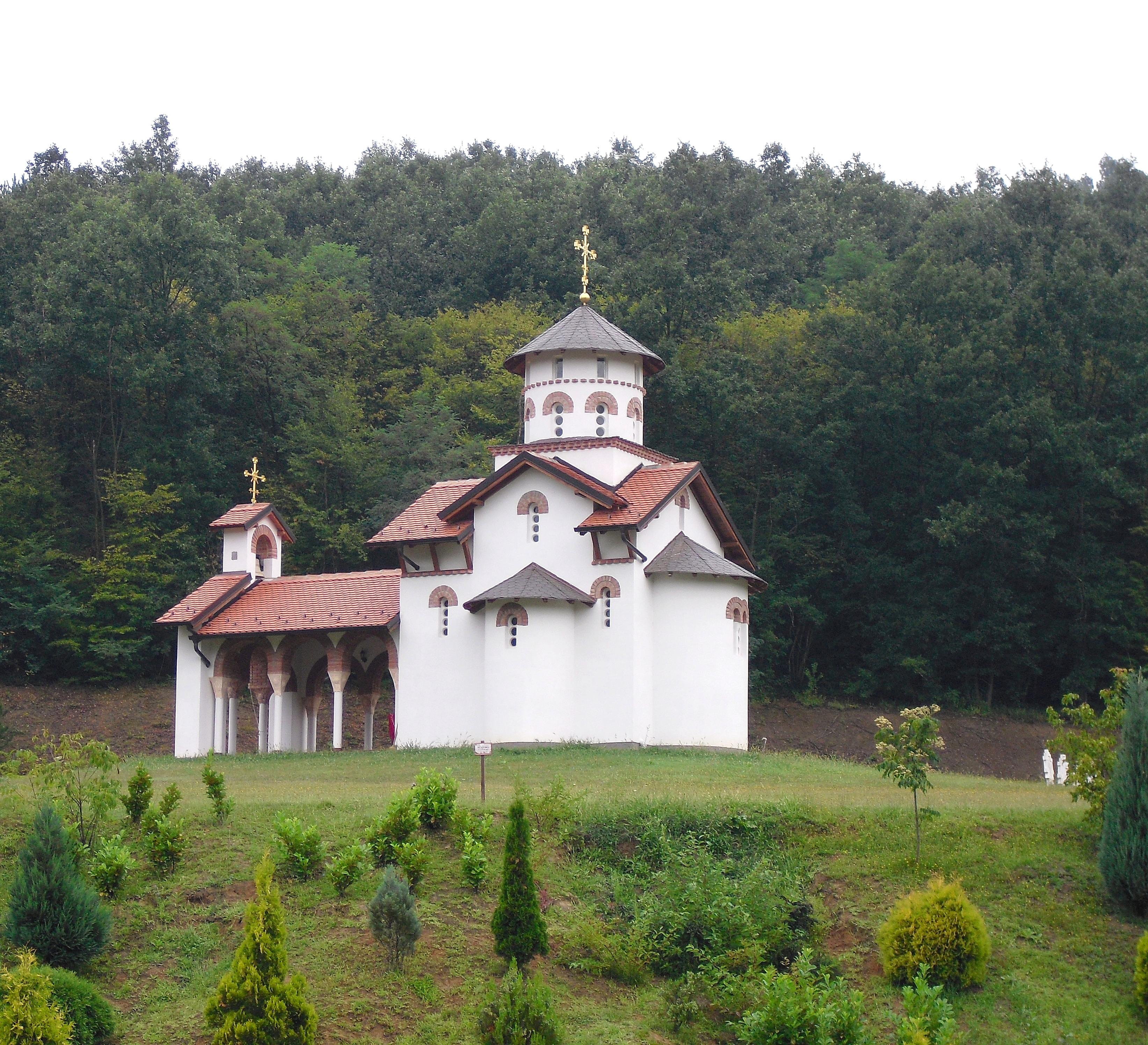 Манастир Каона,нова капела на манастирском гробљу